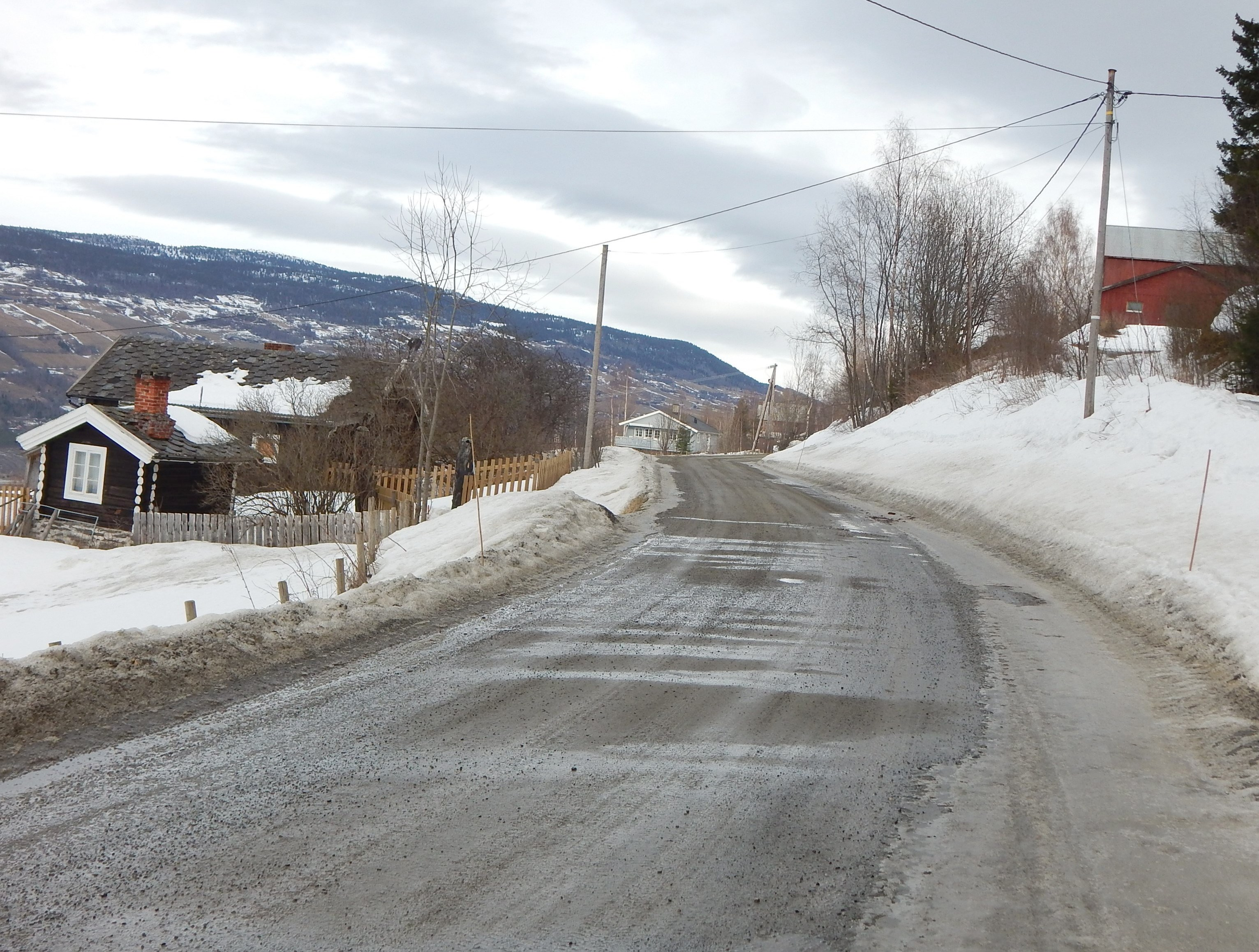 Skrangellivegen (fylkesvei 403) et stykke over primær fylkesvei 256